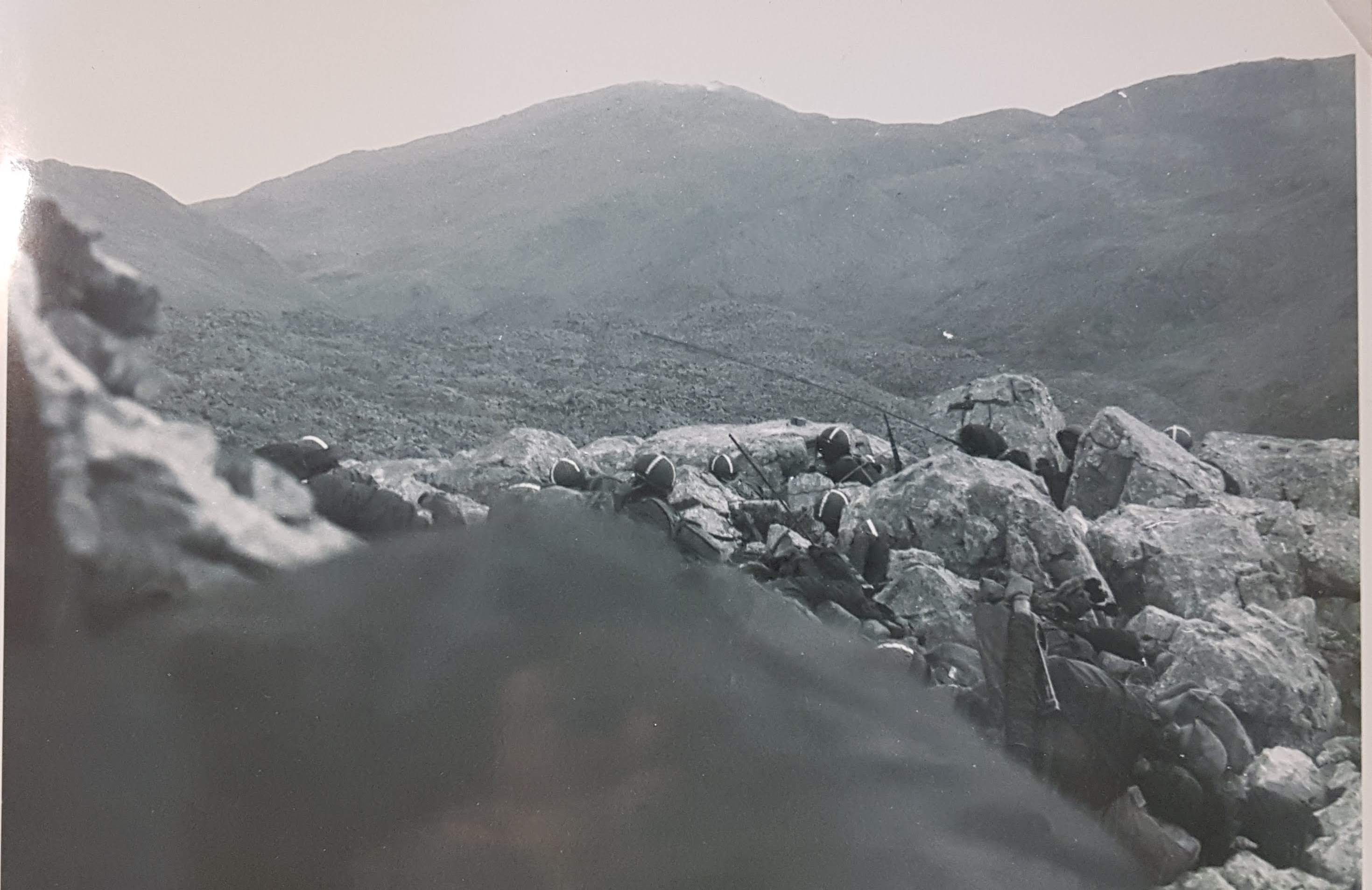 תמונה שצולמה במהלך הקרב